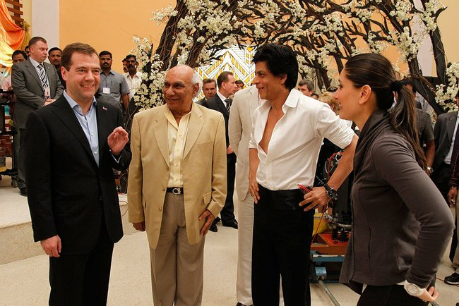 На киностудии в Болливуде. Перед началом встречи с российскими и индийскими кинематографистами.